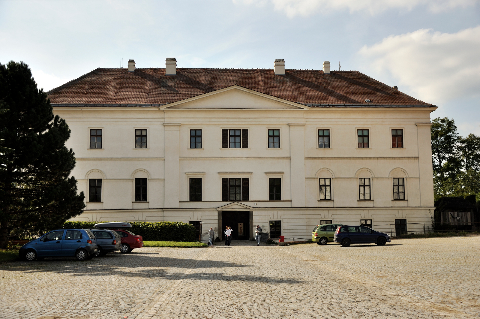 zámek, Žerotínovo nám. 1, Rosice